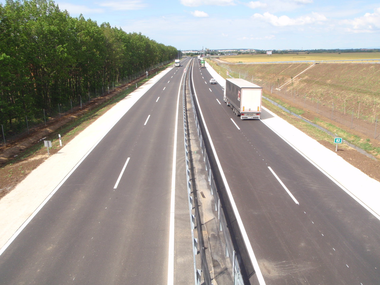 M86 átadott szakasza, háttérben a szombathelyi kezdőcsomópont